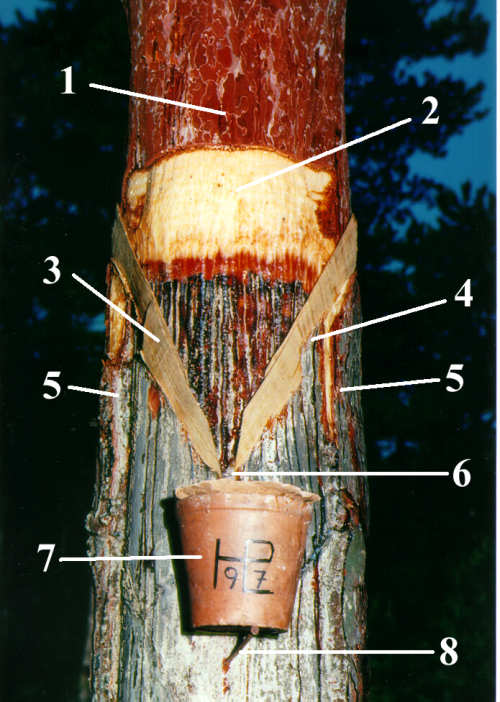 Pechbaum (gepechte Schwarzföhre): Rinde Lachte Pechscharten Laß Leben Schnabel Pechhäferl Nagel Digitalfoto aufgenommen im Juni 1997 im Schwarzföhrenwald Niederösterreichs, nachbearbeitet für einen Informationsfolder Bild (Ernst Schagl) und Bearbeitung (PeterW)